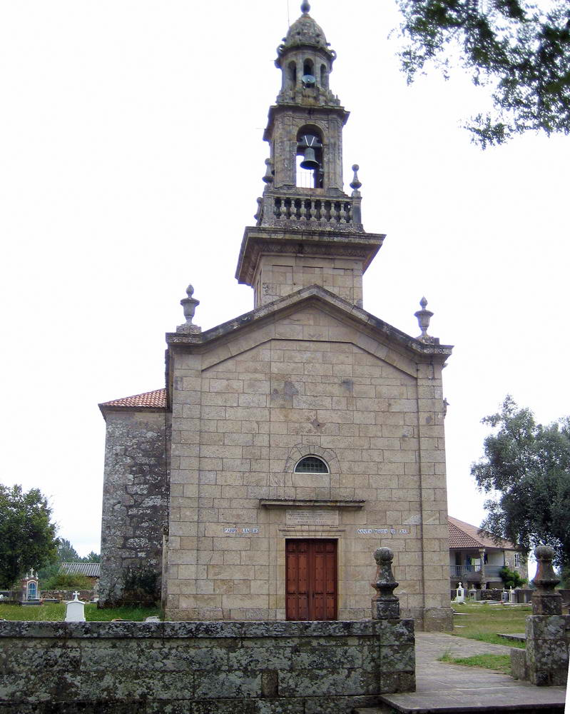 Luou, Teo, Galicia.